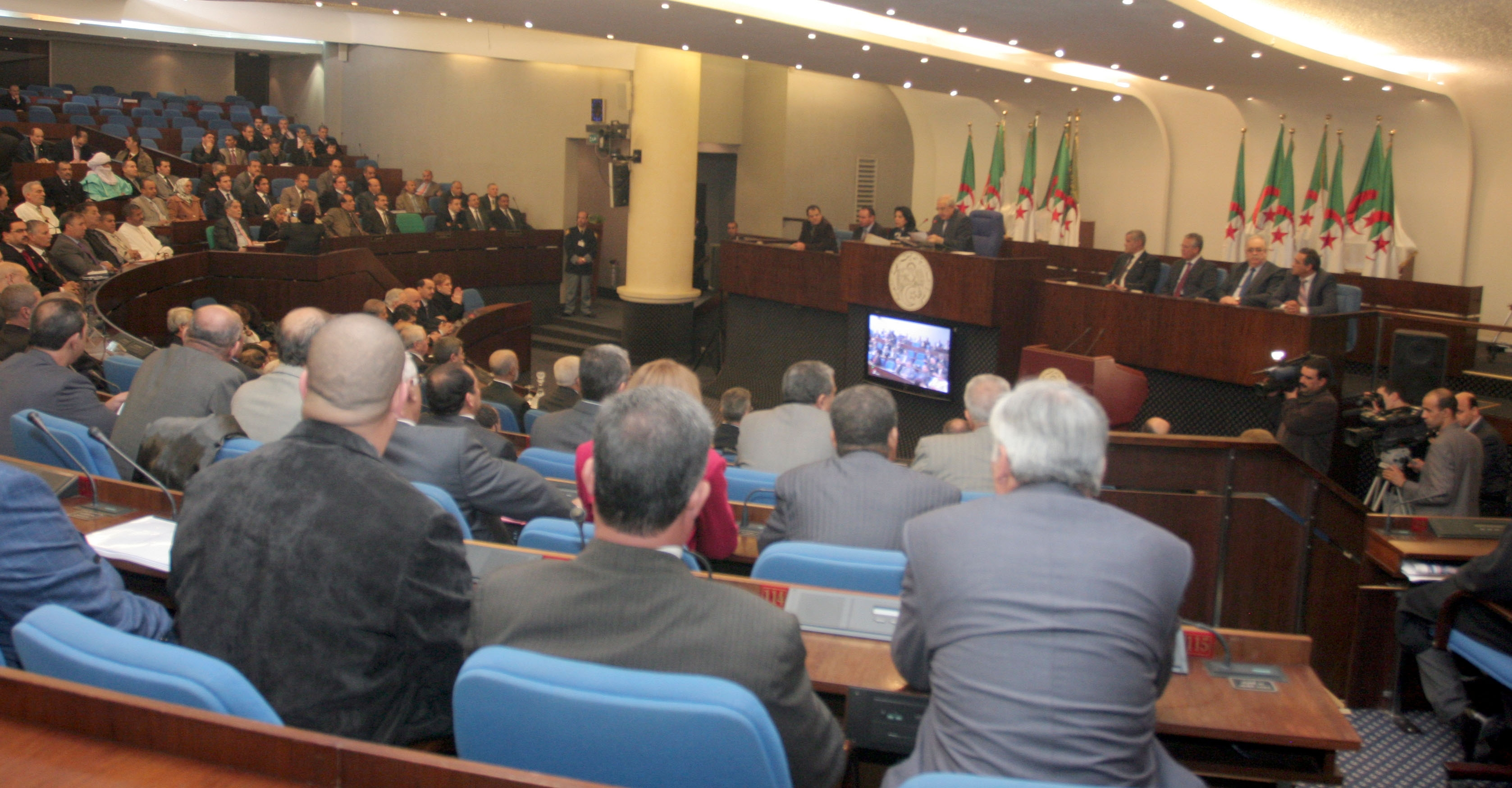 [Lyes Aflou] Women represent only 7.75% of Algeria's National People's Congress but a new bill aims to raise those numbers. النساء يمثلن 7.75 في المائة فقط من المجلس الشعبي الوطني الجزائري، لكن مشروع قانون جديد يسعى إلى رفع هذه النسبة Les femmes représentent seulement 7,75 pour cent du Congrès national populaire en Algérie, mais un nouveau projet de loi pourrait aider à augmenter ce chiffre. Full story: القصة l'histoire